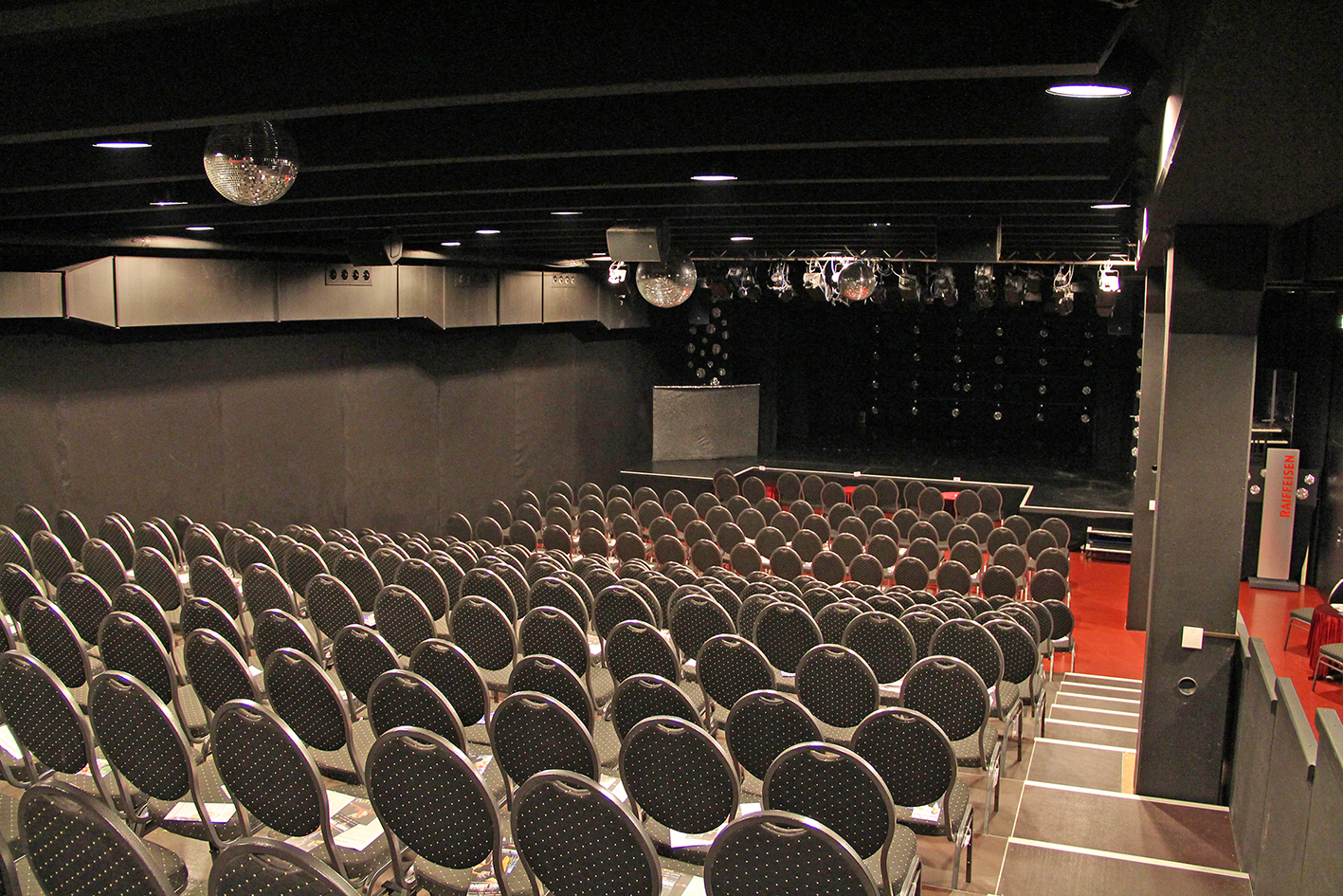 Der Zuschauerraum des Le Théâtre in Kriens bietet Platz für 350 Gäste.